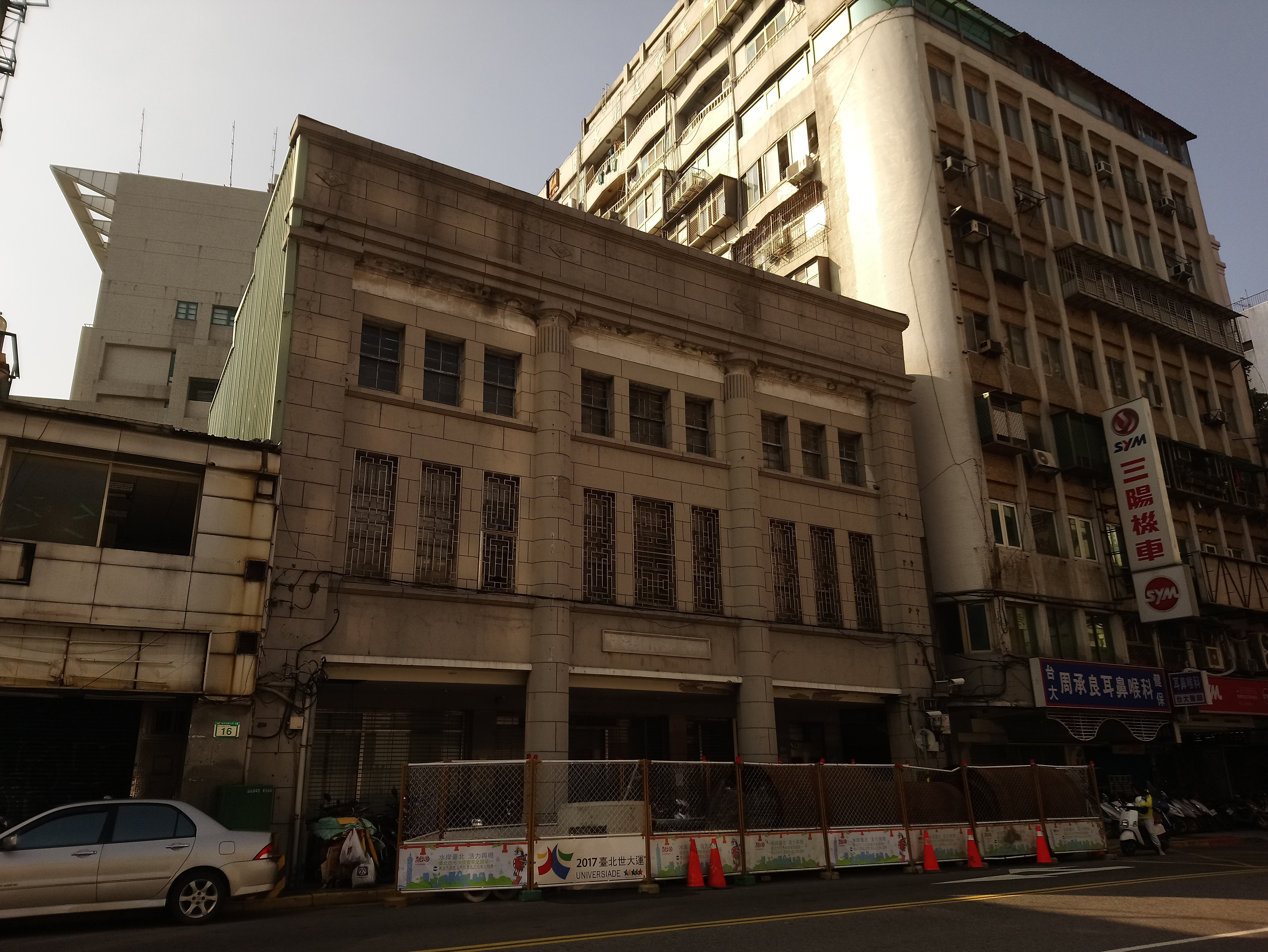 彰化銀行舊北門分行,臺北市大同區延平次分區玉泉里